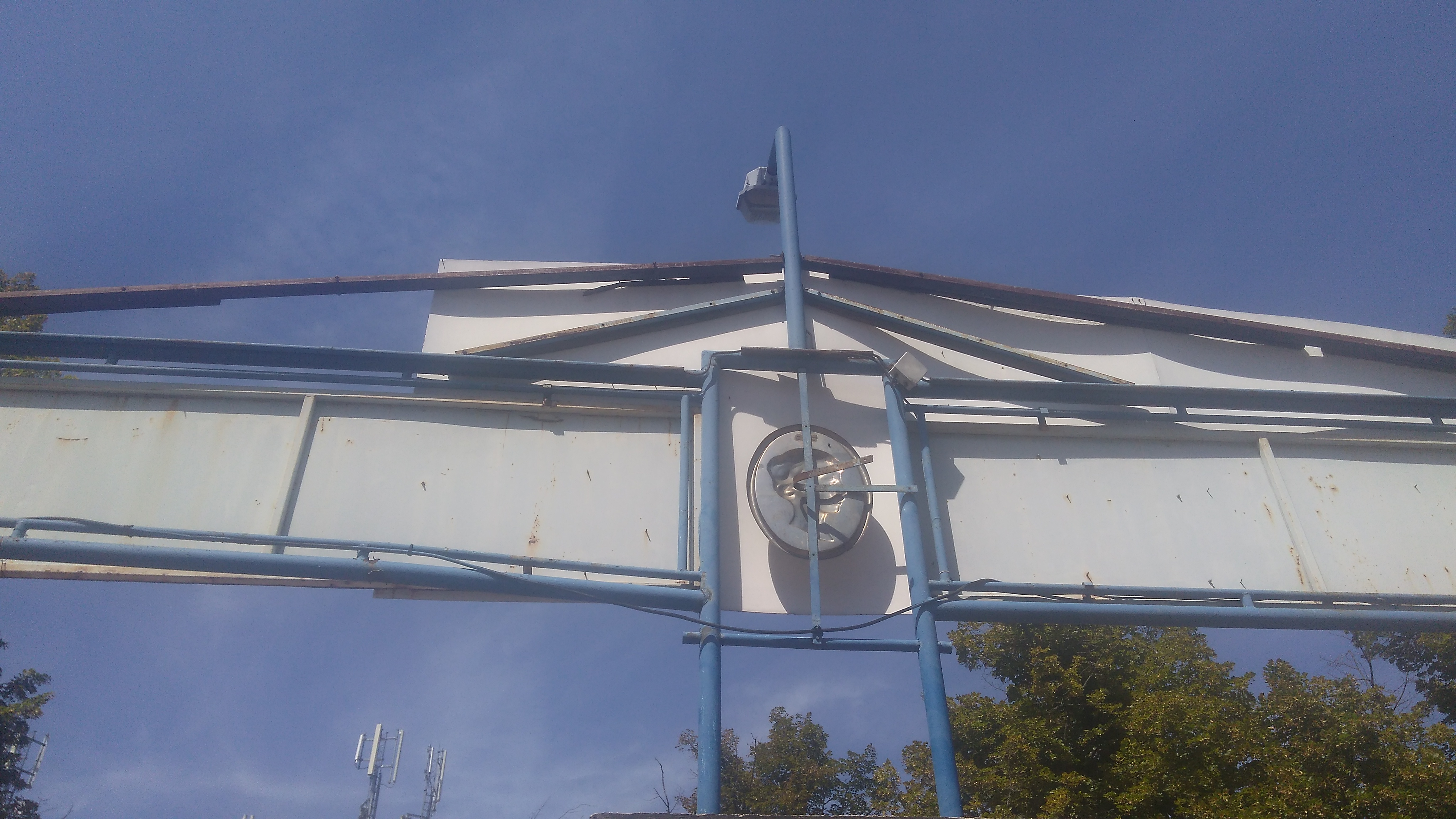 Poldinka ukrytá nad bránou fotbalového stadionu F. Kloze